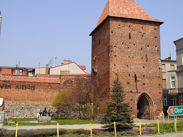 Nowe Miasto Brama Kurzętnicka